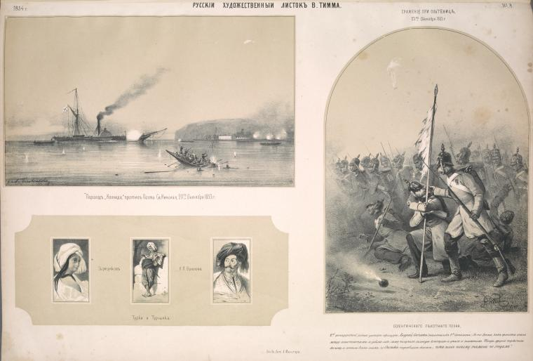 Parakhod 'Kolkhida'; Turki I turchanka; Srazhenie pri Ol'tenitse Selenginskago pekhotnago polka. #1851-1862#